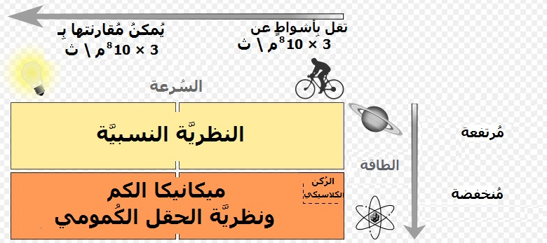 تستخدم نظرية الكم ونظرية النسبية فقط في نمذجة الحاسوب.